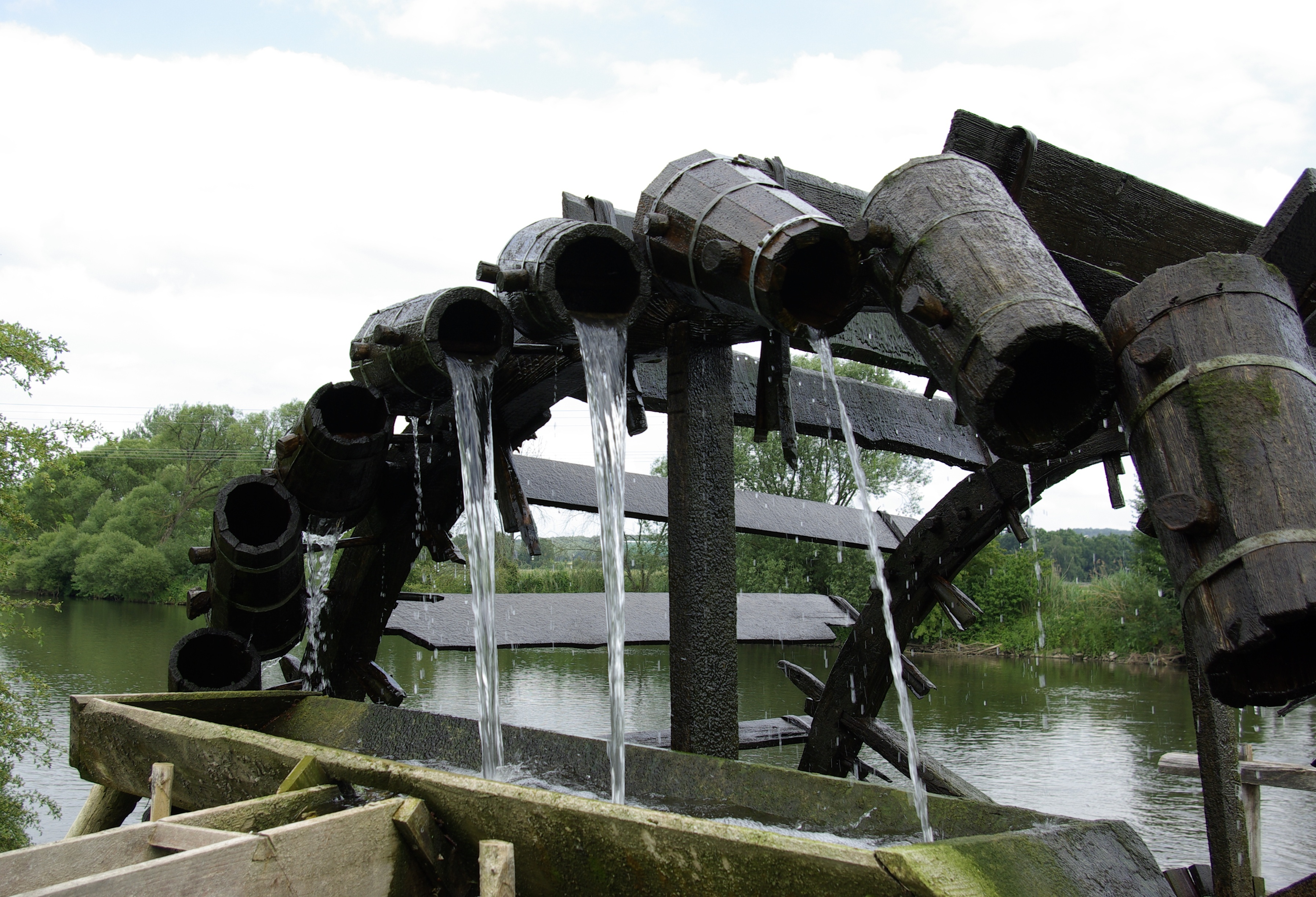 Schöpfrad Wässerwiesenrad an der Regnitz in Möhrendorf.